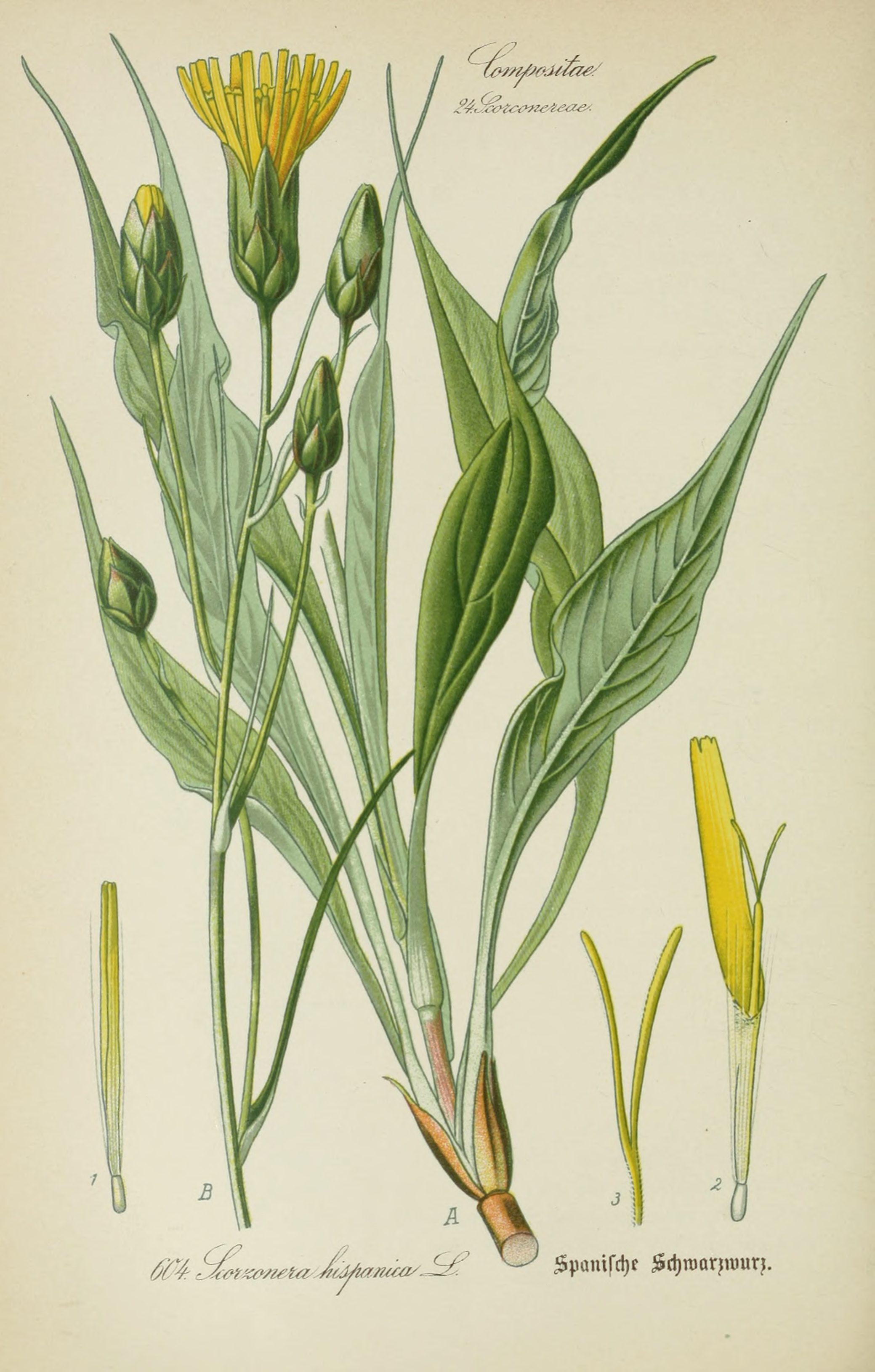 Legende: A Unterer Teil der Pflanze. B Oberer Teil der Pflanze. 1 Zungenblüte, Knospe. 2 Zungenblüte. 3 Griffelspitze. (1-3 vergr.).